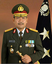 Badrodin Haiti as Chief of East Java Police